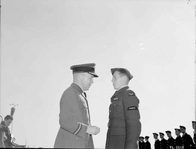 Le commandant de l’air G. O. Johnson présente un insigne ailé à un stagiaire du cours destiné au personnel navigant au camp Borden, le 30 septembre 1940, dans le cadre du Programme d’entraînement aérien du Commonwealth britannique.